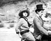 Charlie Chaplin en una escena del filme Mabel at the Wheel (1914).